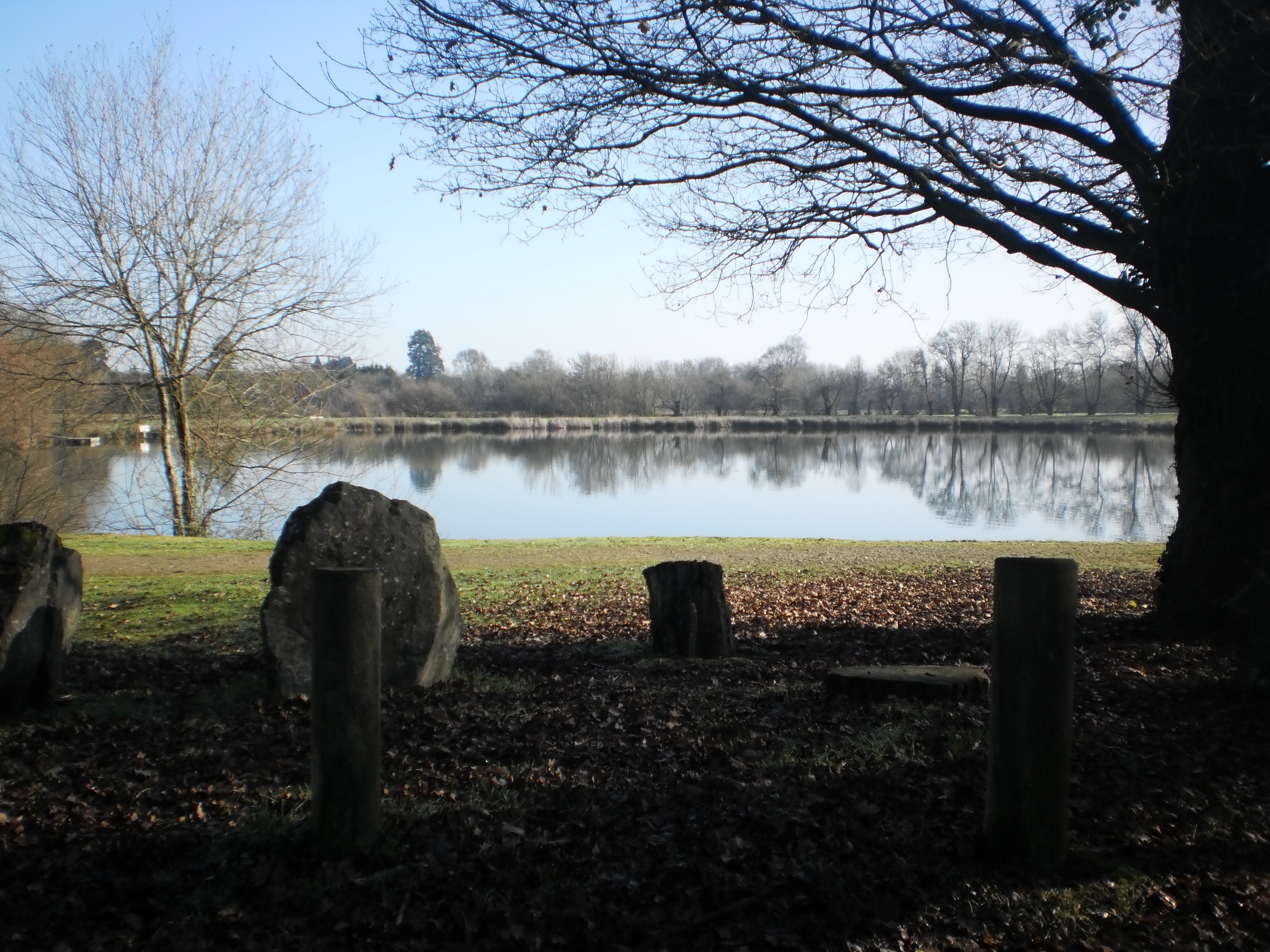 Étang du Plessis - Sainte-Luce-sur-Loire (Loire-Atlantique, France).